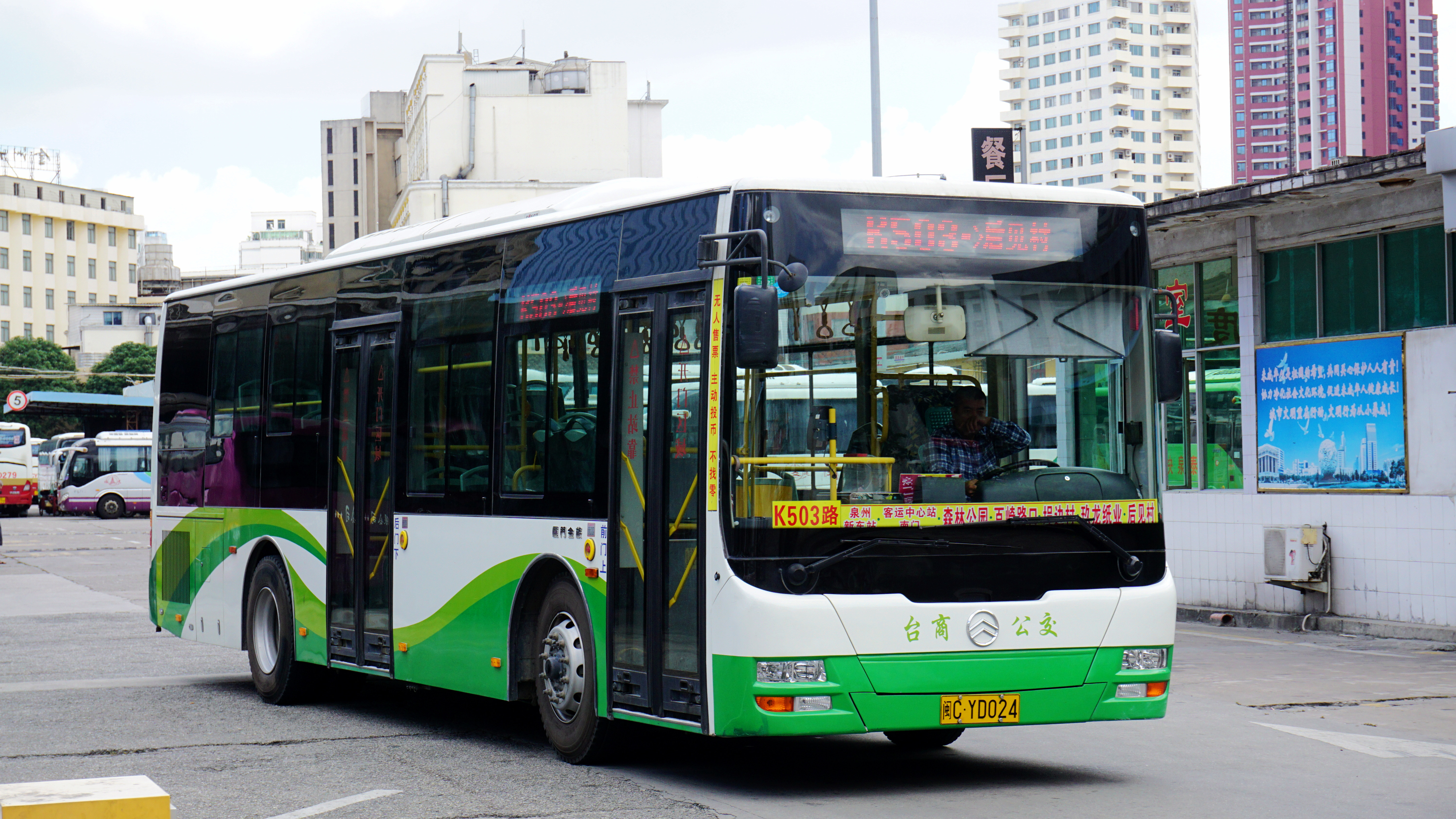 泉州公交K503（原803路），闽CYD024